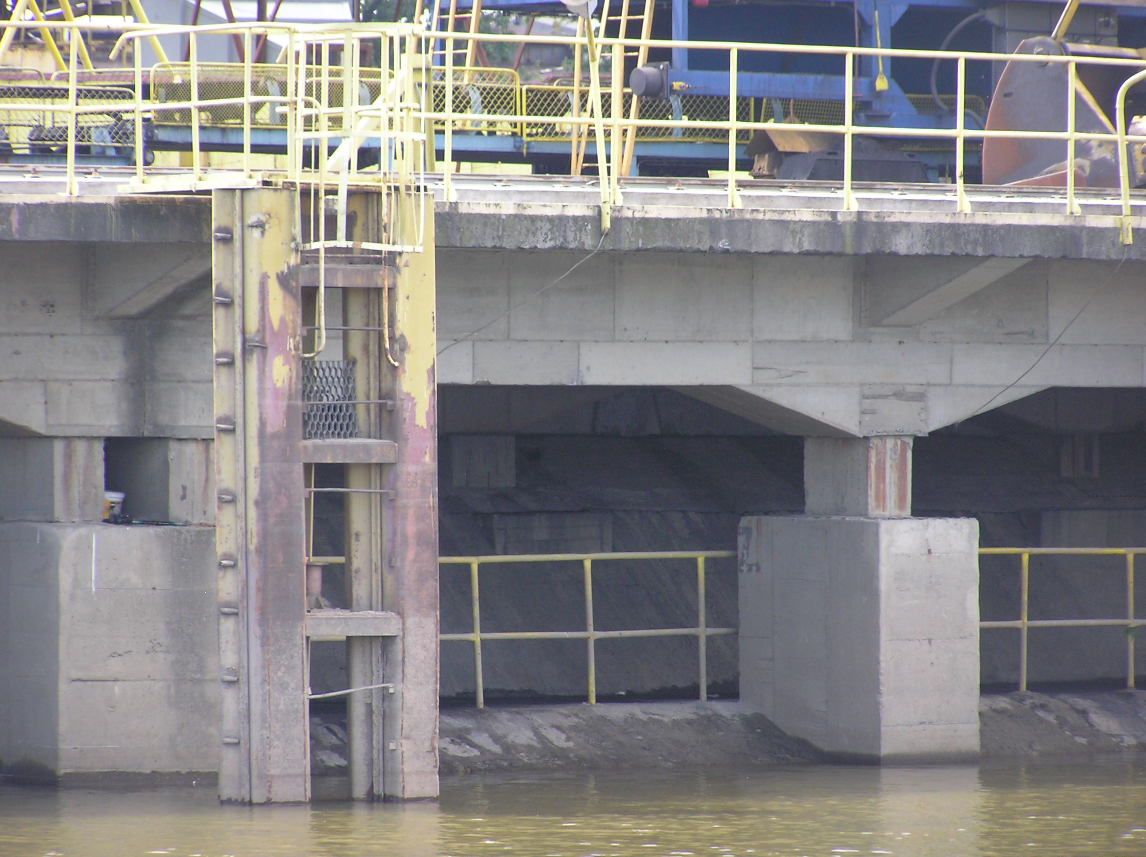 Wrocław, Kleczków, Odra - Kanał Miejski/Stara Odra, Przeładownia Elektrociepłowni Wrocław